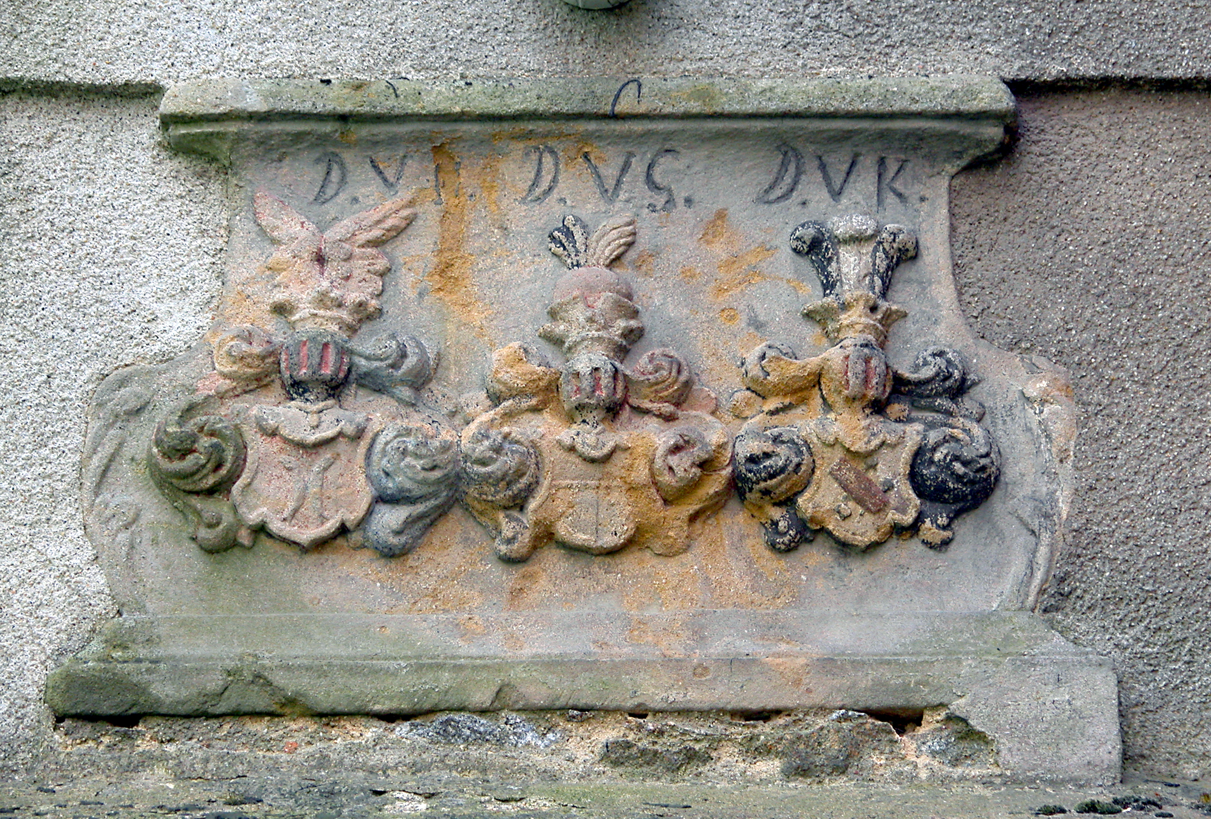 28.04.2008 02708 Bellwitz (Löbau) Alter Schulweg 1 (GMP: 51.127660,14.700404): Schloß Bellwitz, unter derer von Heldreich 1743 erbaut. Supraporte auf der Ostseite mit Wappen der Familien von Hartitzsch, von Gersdorff und von Klüx. [DSCN32556.TIF]20080428588DR.JPG(c)Blobelt